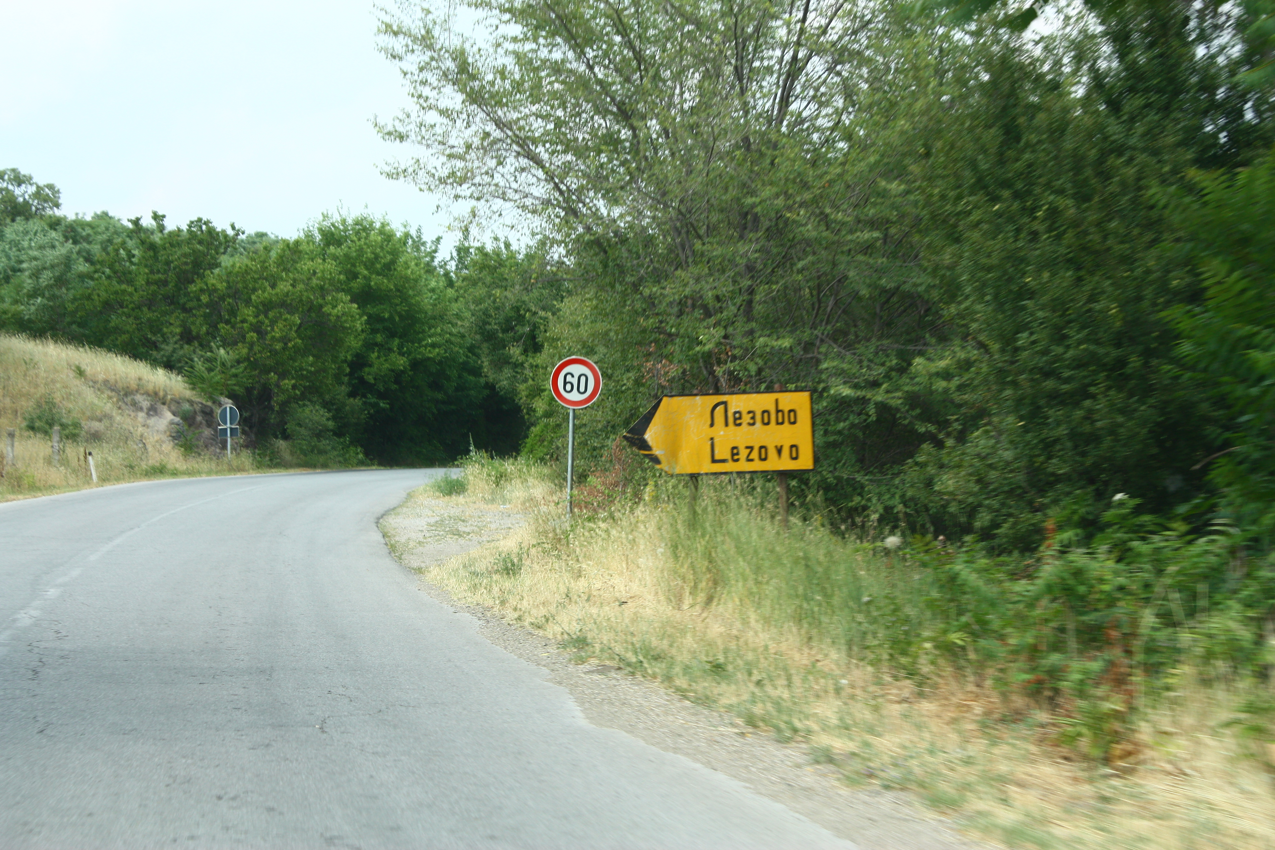 Gign to Lezovo